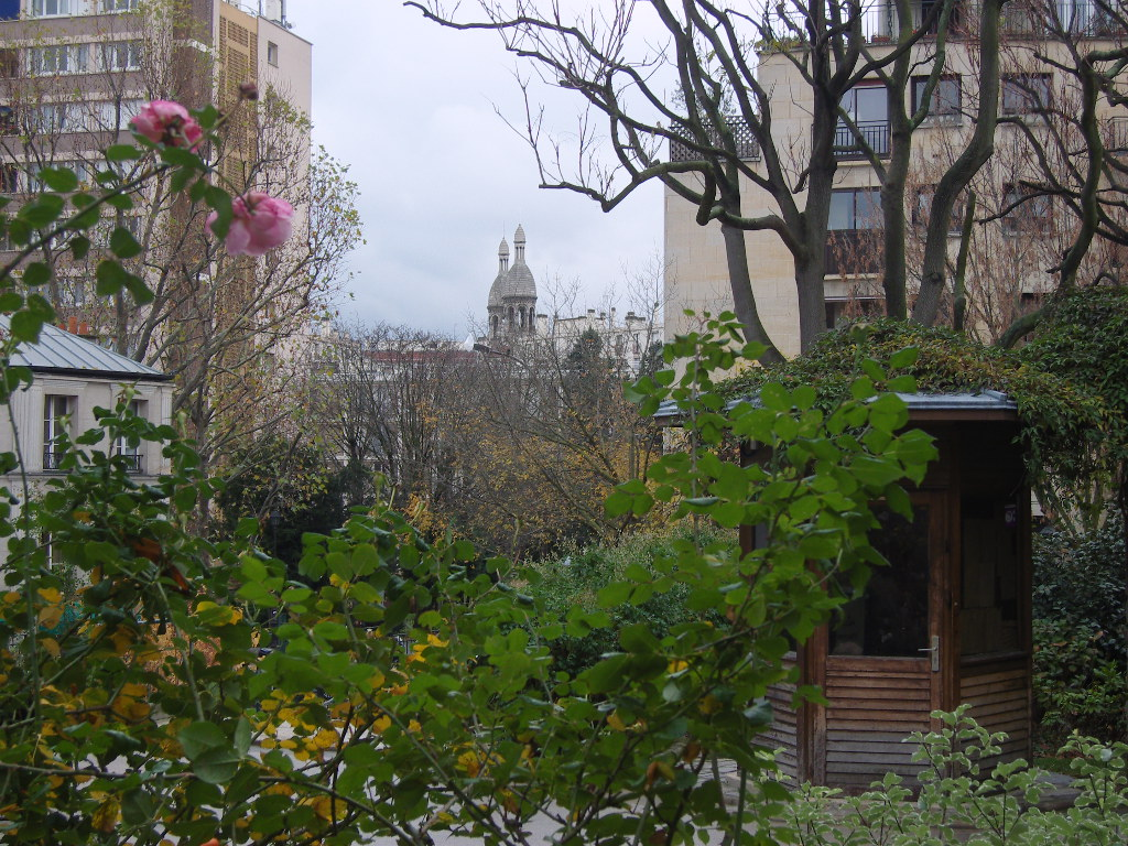 Paris 13e, square de la Montgolfière, au fond l'église Sainte-Anne-de-la-Butte-aux-Cailles